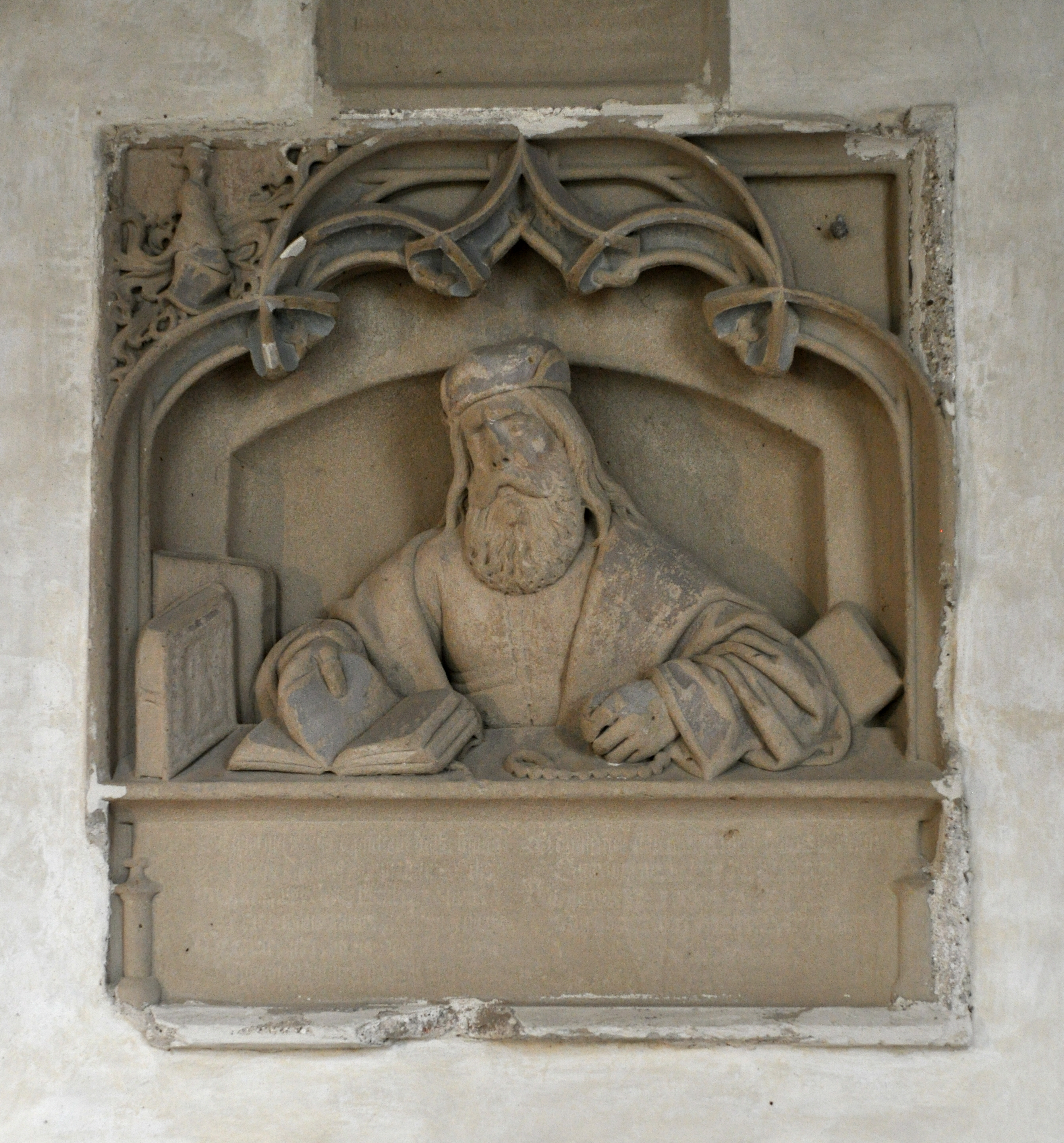 Augsburg, Dom, Kreuzgang, Ostflügel, 6. Joch, Epitaph für Dr. Adolf Occo (* 1456 in Osterhusen, Friesland; † 4. Juli 1503), Doktor der Medizin und der schönen Künste, Humanist, Stadtarzt von Augsburg, Arzt des Domkapitels, vermutlich Leibarzt des Bischofs Johann von Werdenberg. Kosel Nr. 62. Porträt des Verstorbenen mit Büchern und Rosenkranz. Mit Helmzier des Wappens Occo (optisch links) und einem inzwischen verlorenen Wappenschild (optisch rechts, ein Adler). Gregor Erhart zugeschrieben, um 1503/1504. Attributed to Gregor Erhart (1470–1540) DescriptionGerman sculptorDate of birth/death 1470 1540 Location of birth/death Ulm AugsburgWork location Ulm, AugsburgAuthority control : Q675137 VIAF: 5069338 ISNI: 0000 0000 8084 5134 ULAN: 500026699 LCCN: n84208103 WGA: ERHART, Gregor WorldCat creator QS:P170,Q4233718,P1773,Q675137